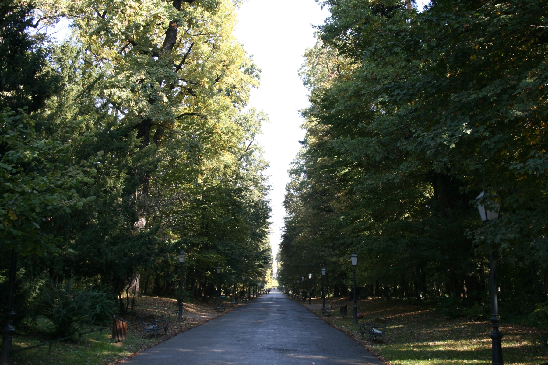 Maksimir, Zagreb